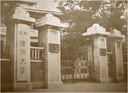 中文（中国大陆）: 私立津沽大学校门